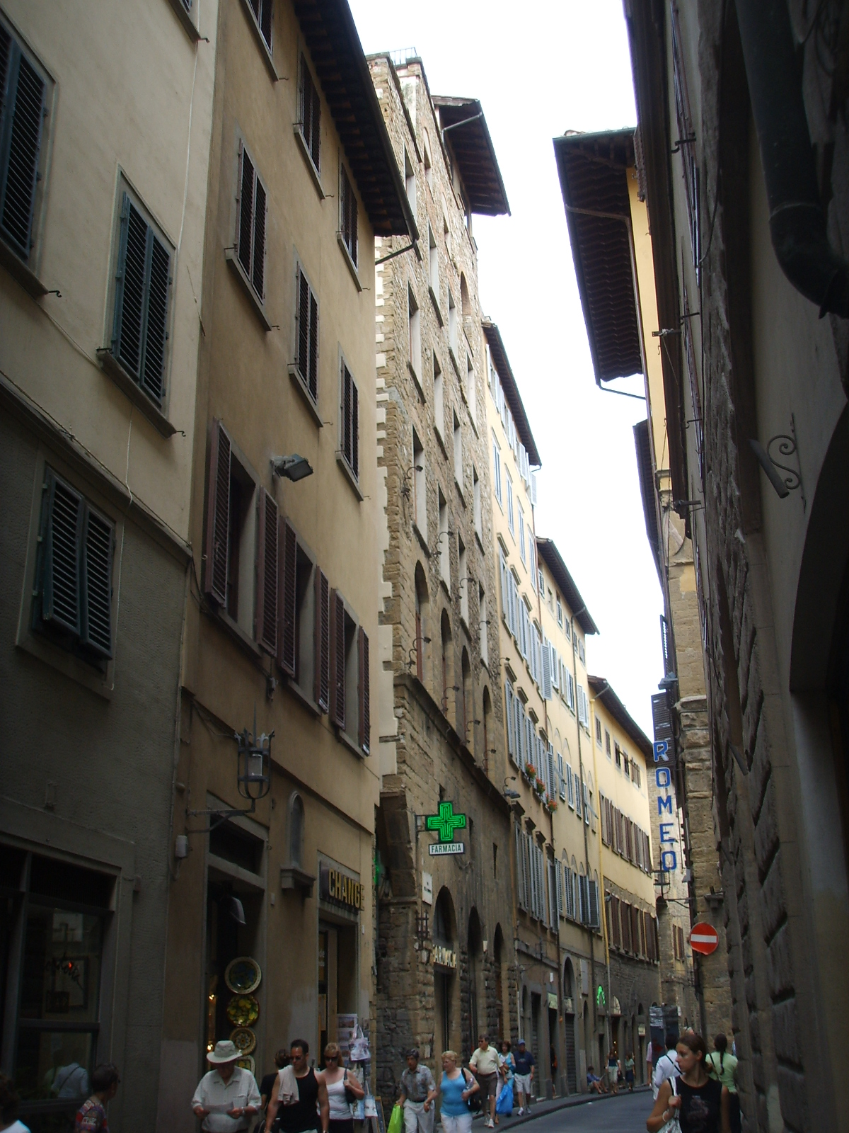 Palazzo via della condotta